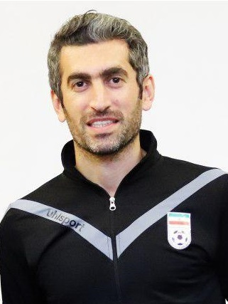 تصاویر مرحله دوم کلاس مربیگری B آسیا در تهران به مدرسی امیر حسین پیروانی با حضور ستارگان سابق فوتبال مثل تیموریان، جباری، حیدری،‌عمران‌زاده، بیک‌زاده و بنگر